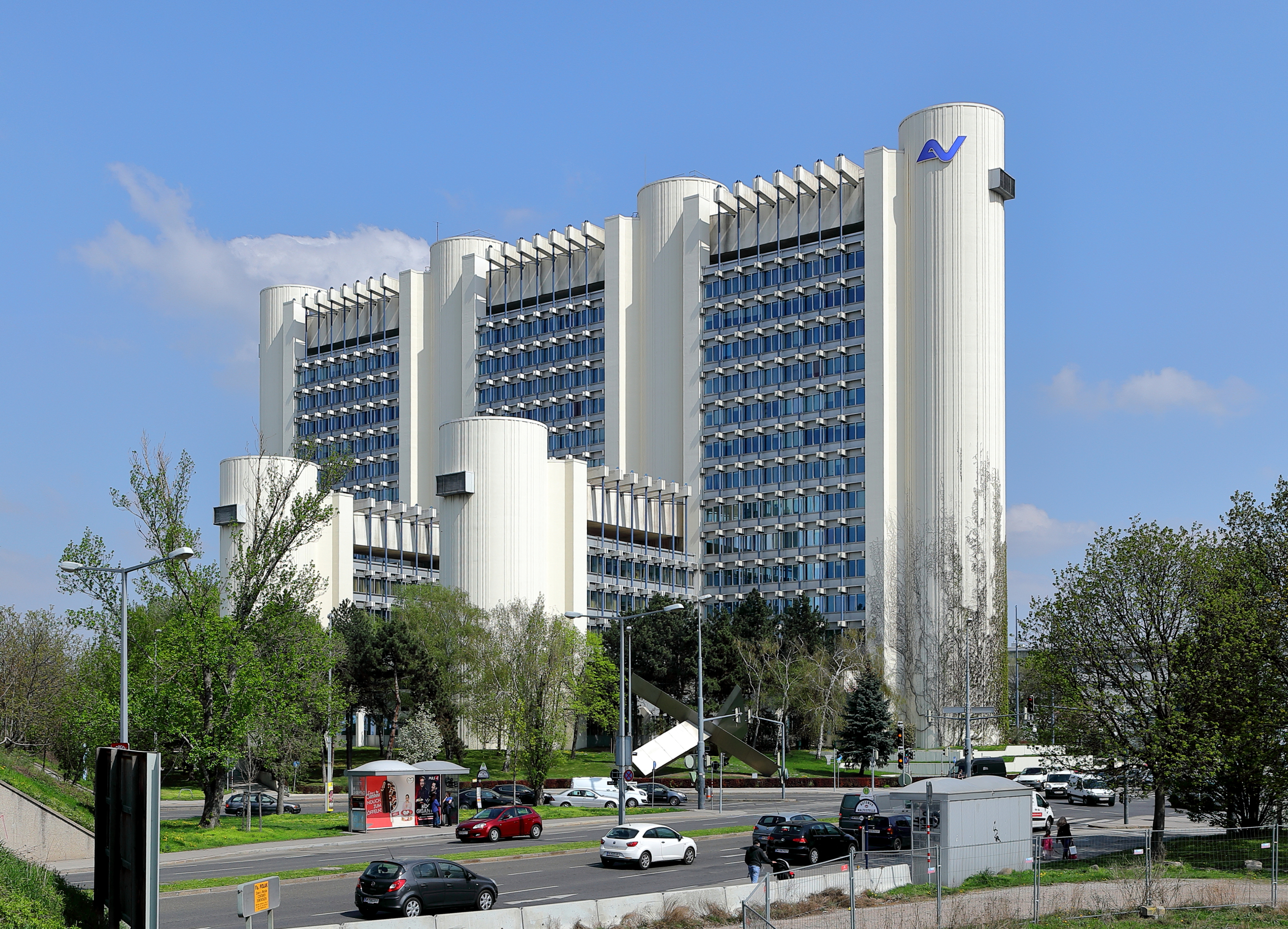 Die Zentrale der Allgemeinen Unfallversicherungsanstalt (AUVA) an der Adresse Adalbert-Stifter-Straße 65 im 20. Wiener Bezirk Brigittenau.Der Baukomplex wurde ab 1972 nach Plänen des Architekten Kurt Hlaweniczka (Statik Kurt Koss) errichtet und am 6. Mai 1977 eröffnet. Das Gebäude ist eine Art Hängekonstruktion mit 4 Stahlbetontürme von rd. 64 m Höhe und 6 Stahlbetontürme mit rd. 31 m Höhe (2 westseitig und 4 ostseitig). Diese sind in der Art eines Brückenbauwerks miteinander verbunden und an diesen Verbindungselementen sind mittels Stahlhängesäulen drei- beziehungsweise zwölfgeschossige Bürokomplexe aufgehängt. Die monumentale Nirosta-Skulptur vor dem Gebäude ist ein Werk von dem Künstler Oskar Höfinger aus dem Jahr 1977.